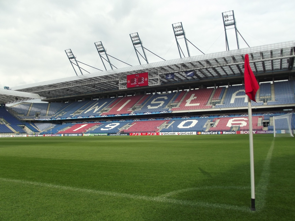 Zdjęcie zrobione przed treningiem przed meczem Wisła Kraków - APOEL Nikozja.